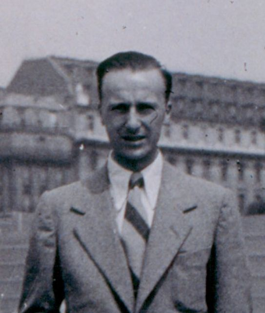 Angelo Bianchetti, progettista degli autogrill Pavesi, fotografato con Le Corbusier, Parigi 1937 (Barilla G. e R. Fratelli spa, Archivio storico, Fondo Barilla)